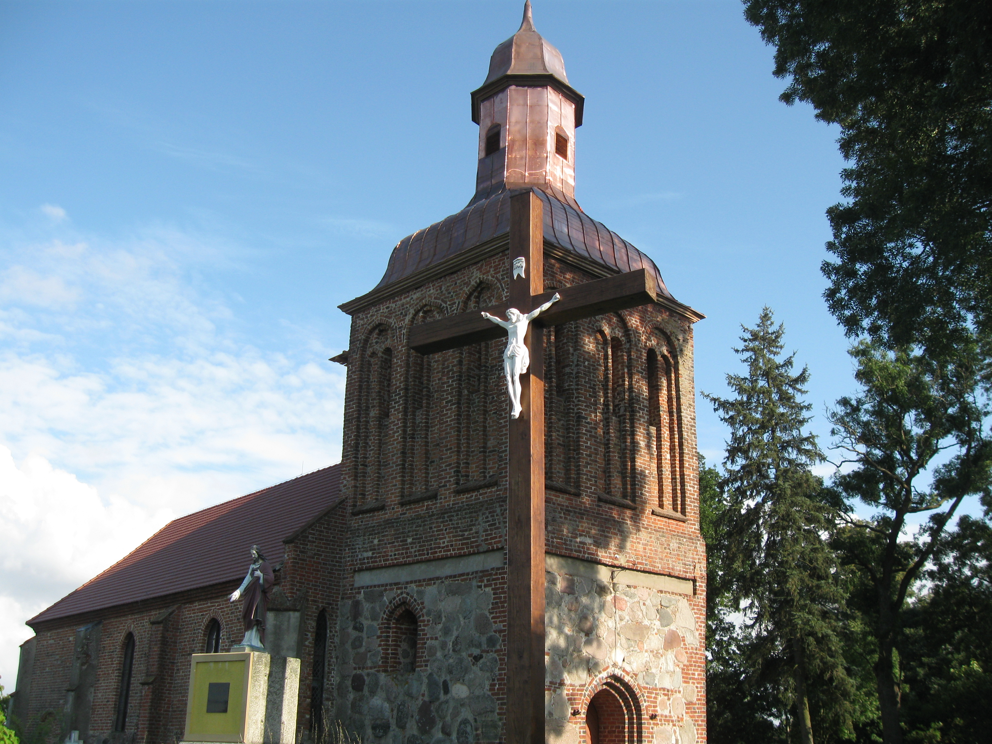 Niemierze - rzymskokatolicki kościół filialny pw. Najświętszego Serca Pana Jezusa, gotycki z XIV w., rozbudowywany w XV i XVI w., odnawiany w 1741 i 1876 r.